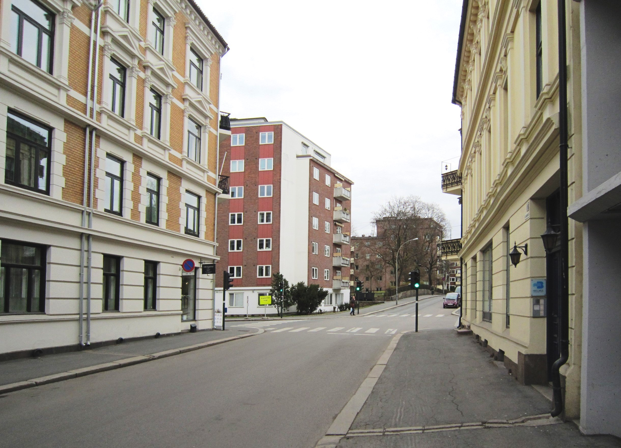 Majorstuveien sørøstover mot krysset ved Industrigata